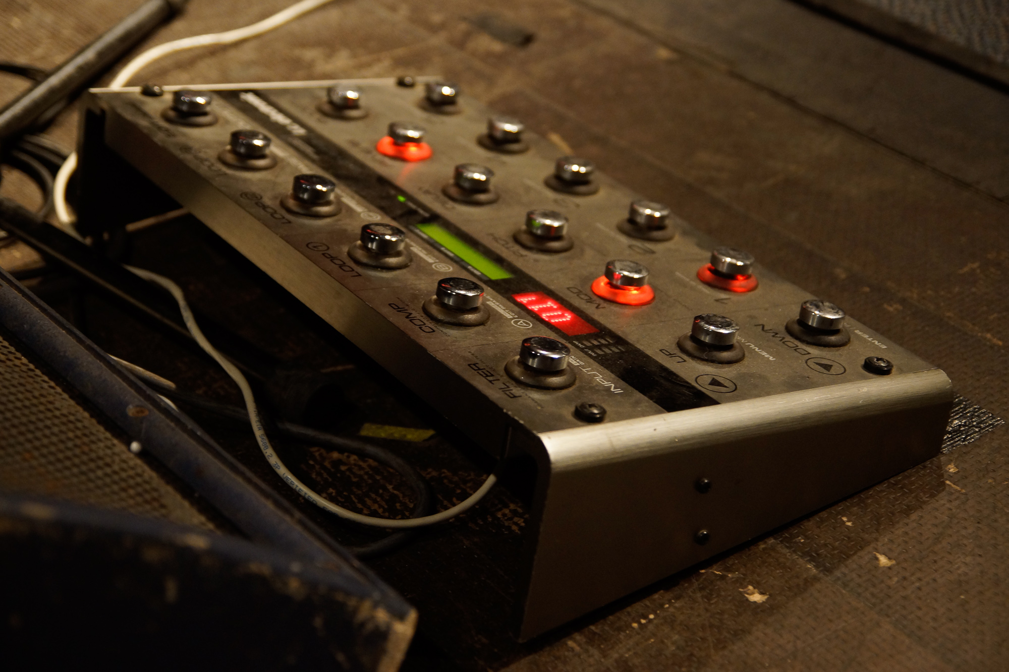 Procesor gitarowy TC Electronic G System.